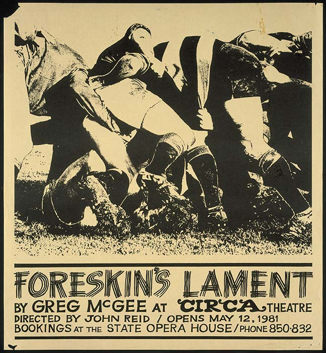 Afisz teatralny sztuki Greg McGee " Foreskin’s lament"